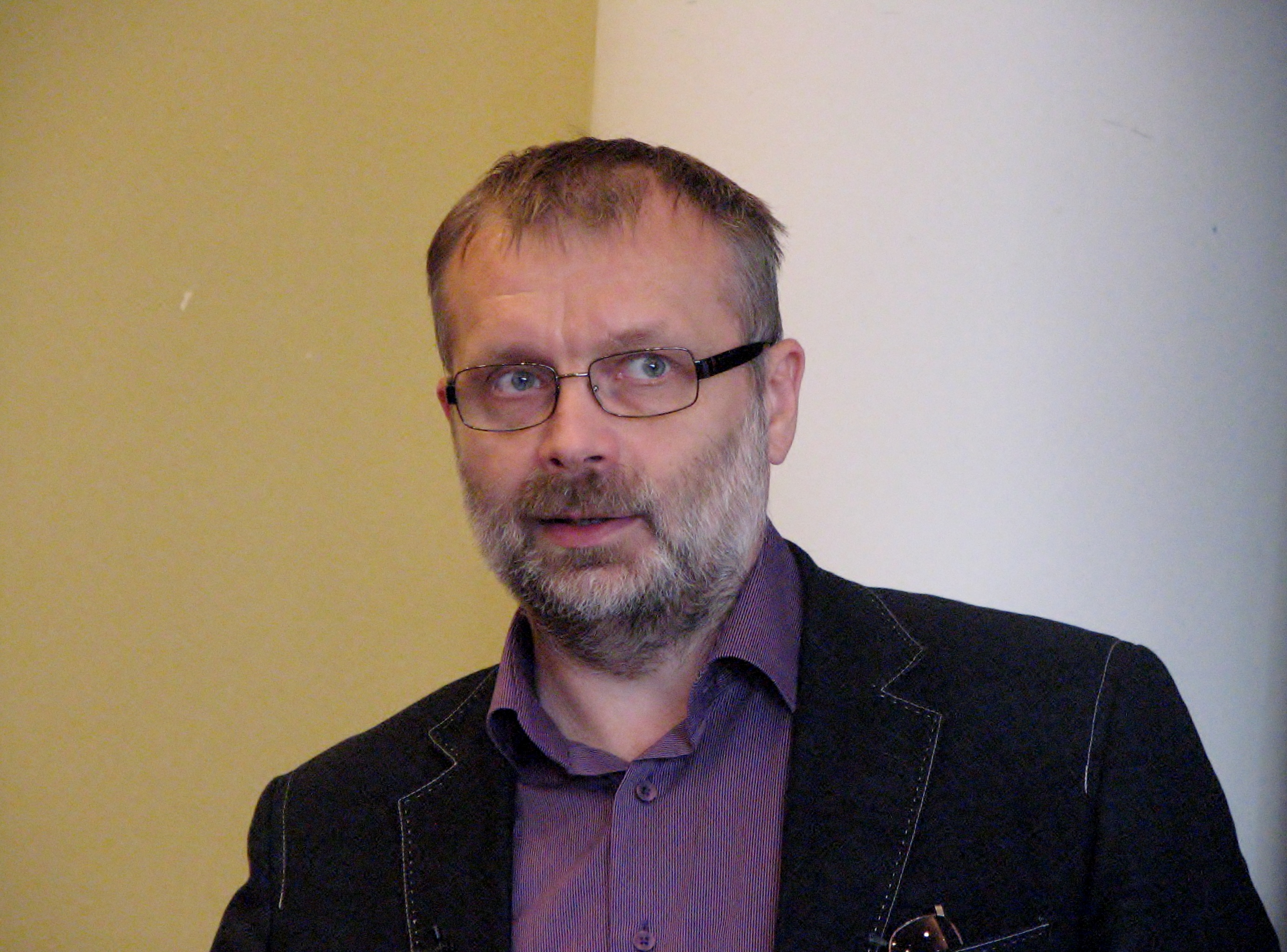 Urmas Kukk koolitamas Eesti kohtuametnikke isikuandmete kaitse teemal